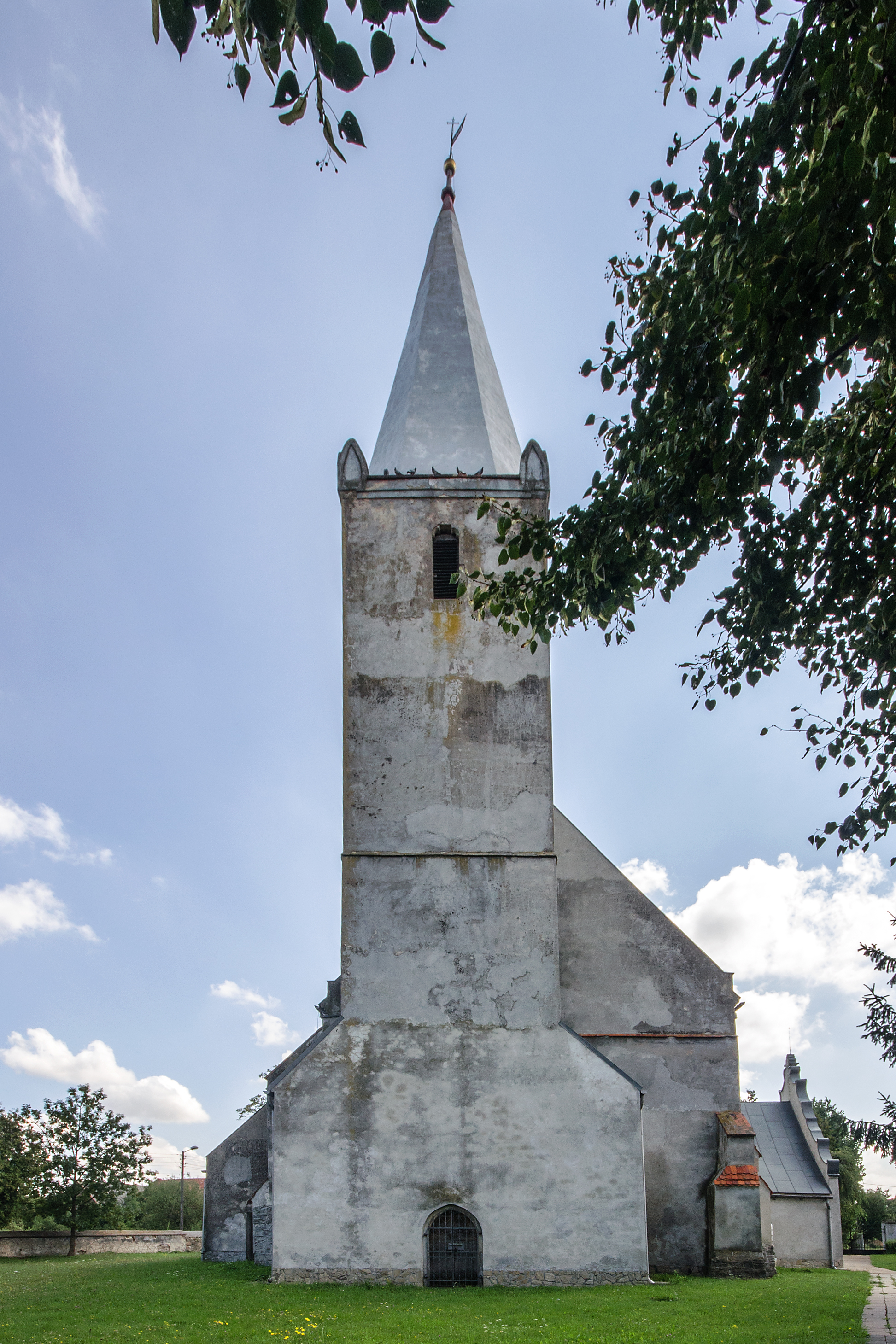 Bąków - rzymskokatolicki kościół filialny p.w. św. Katarzyny, poł. XIV, XVI